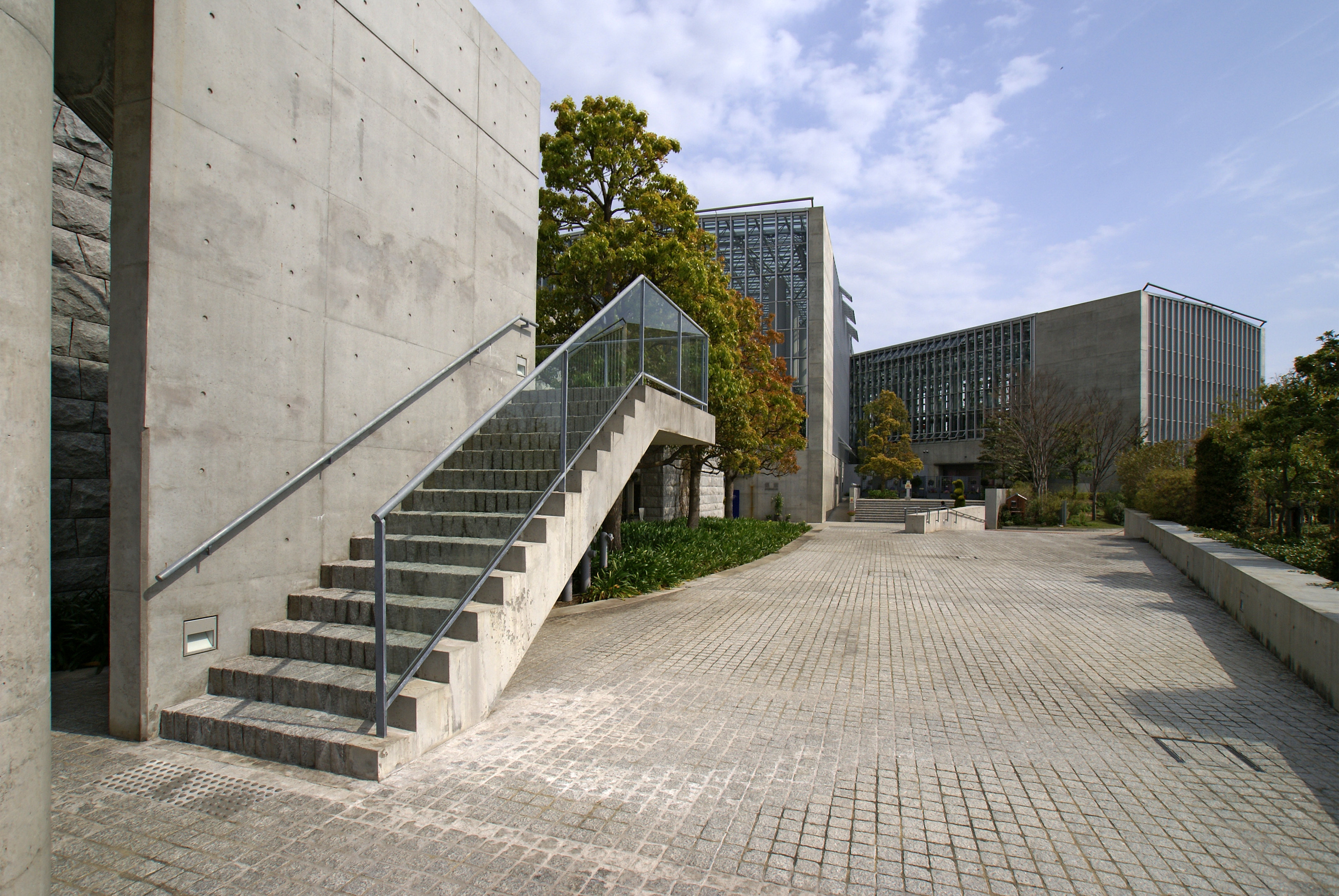 Awaji Yumebutai in Awaji, Hyogo prefecture, Japan